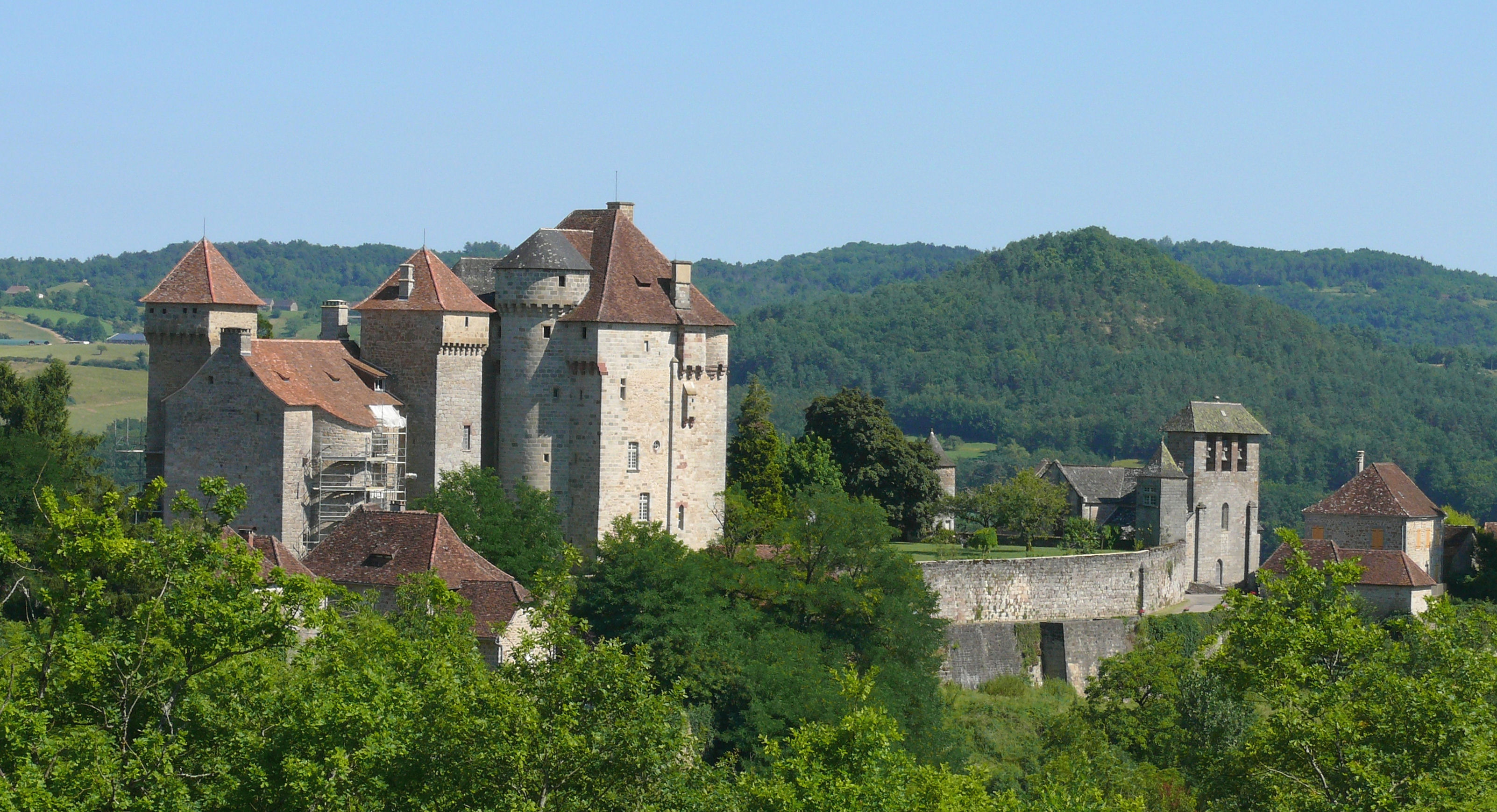 Château des Plas à Curemonte (Corrèze, France)